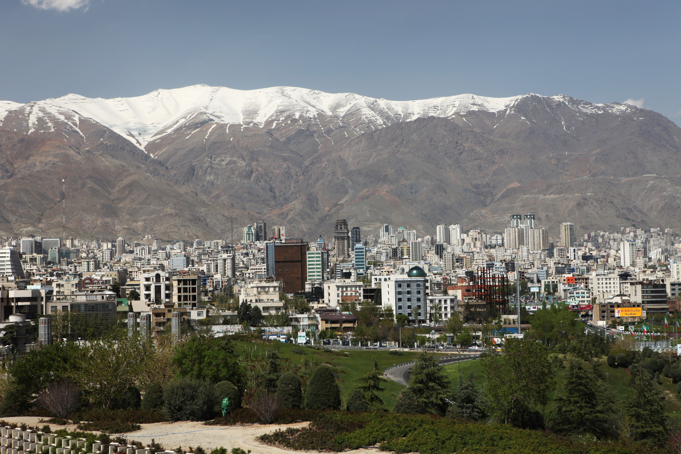 Tehran